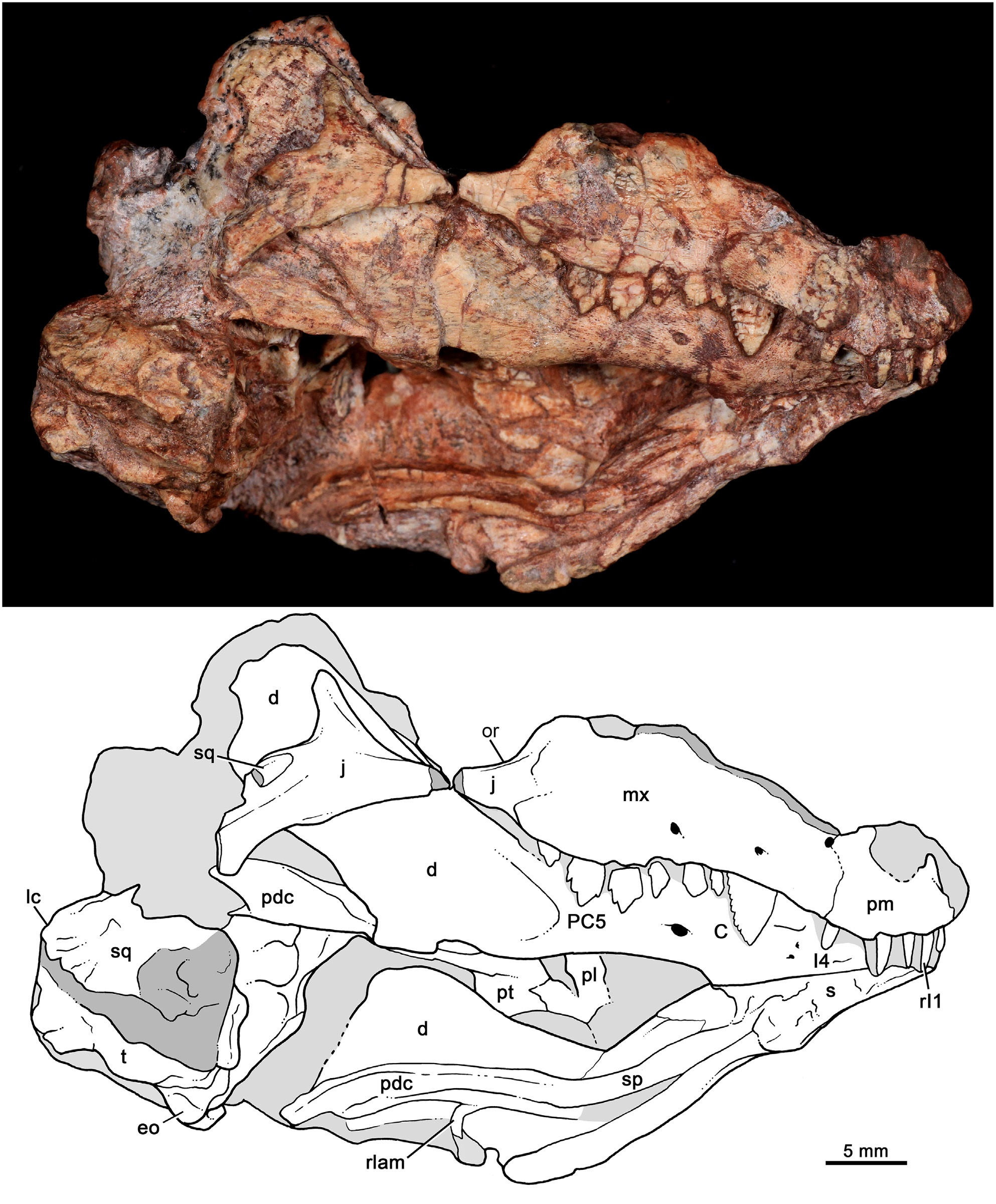 Bonacynodon schultzi, holotype MCT-1716-R. Partial skull and lower jaws, with the secondary palate horizontally positioned, in ventral view. Dark grey indicates broken areas and soft grey indicates matrix.